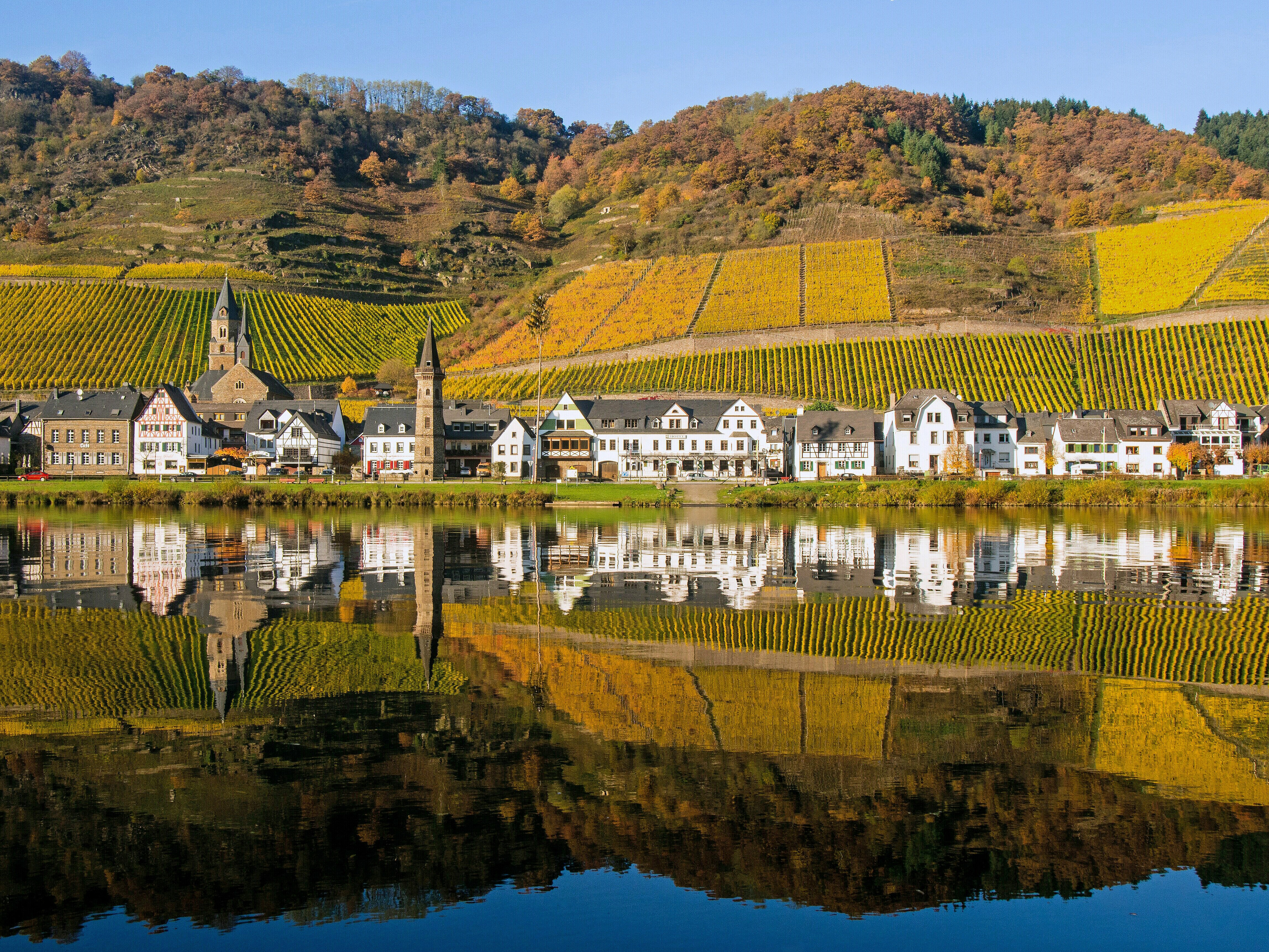 An einem strahlenden Herbsttag spiegeln sich Ort und Weinberge in der Mosel wider.